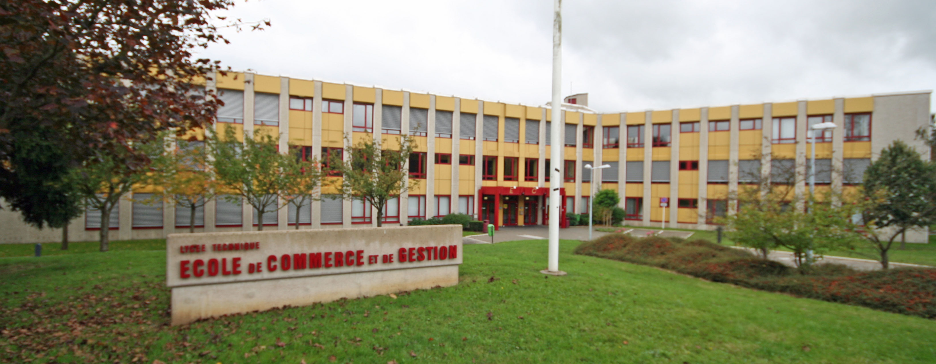 Den ECG.